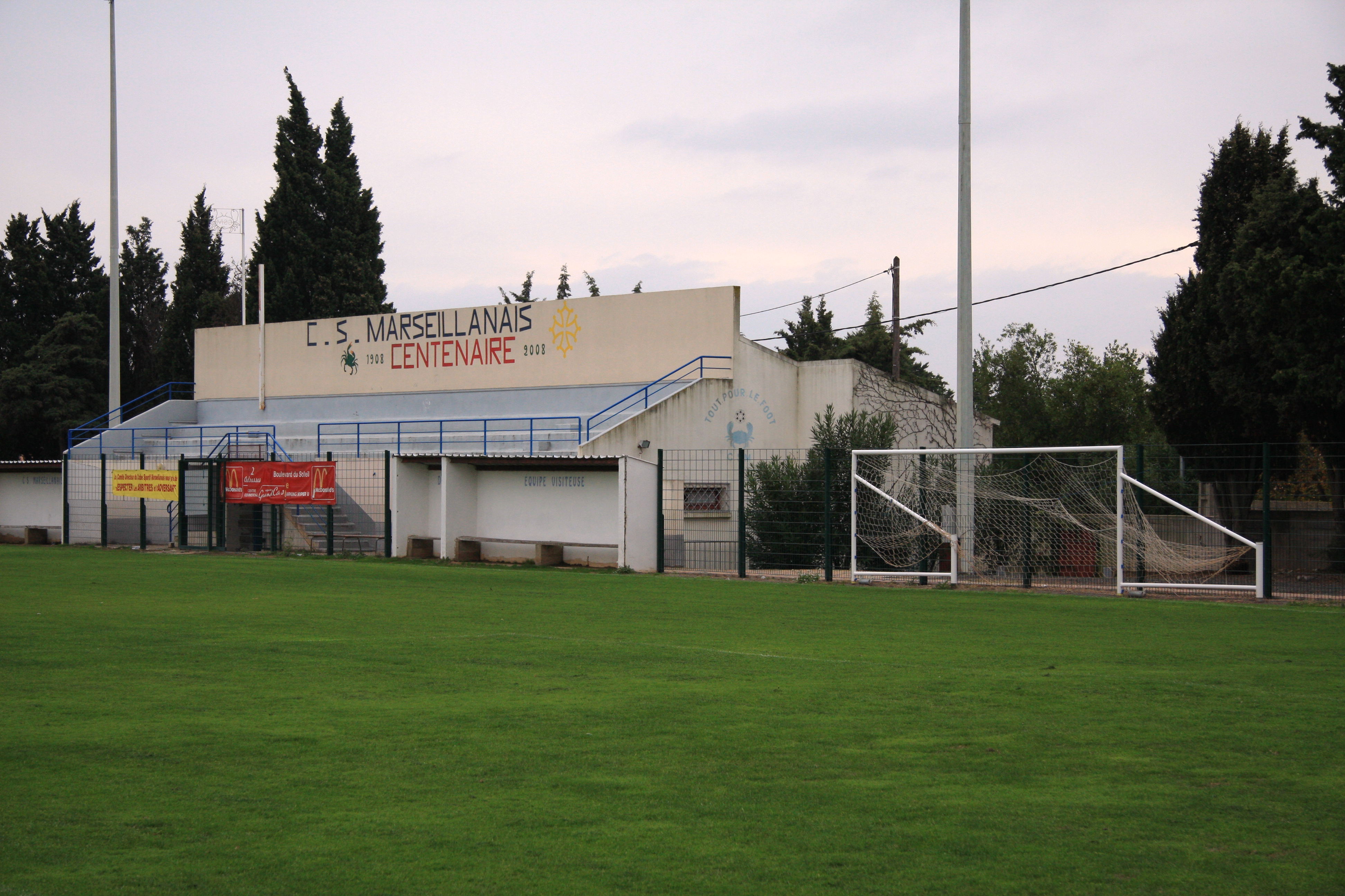 Stade du Crabe Sportif Marseillanais (Marseillan, Hérault).